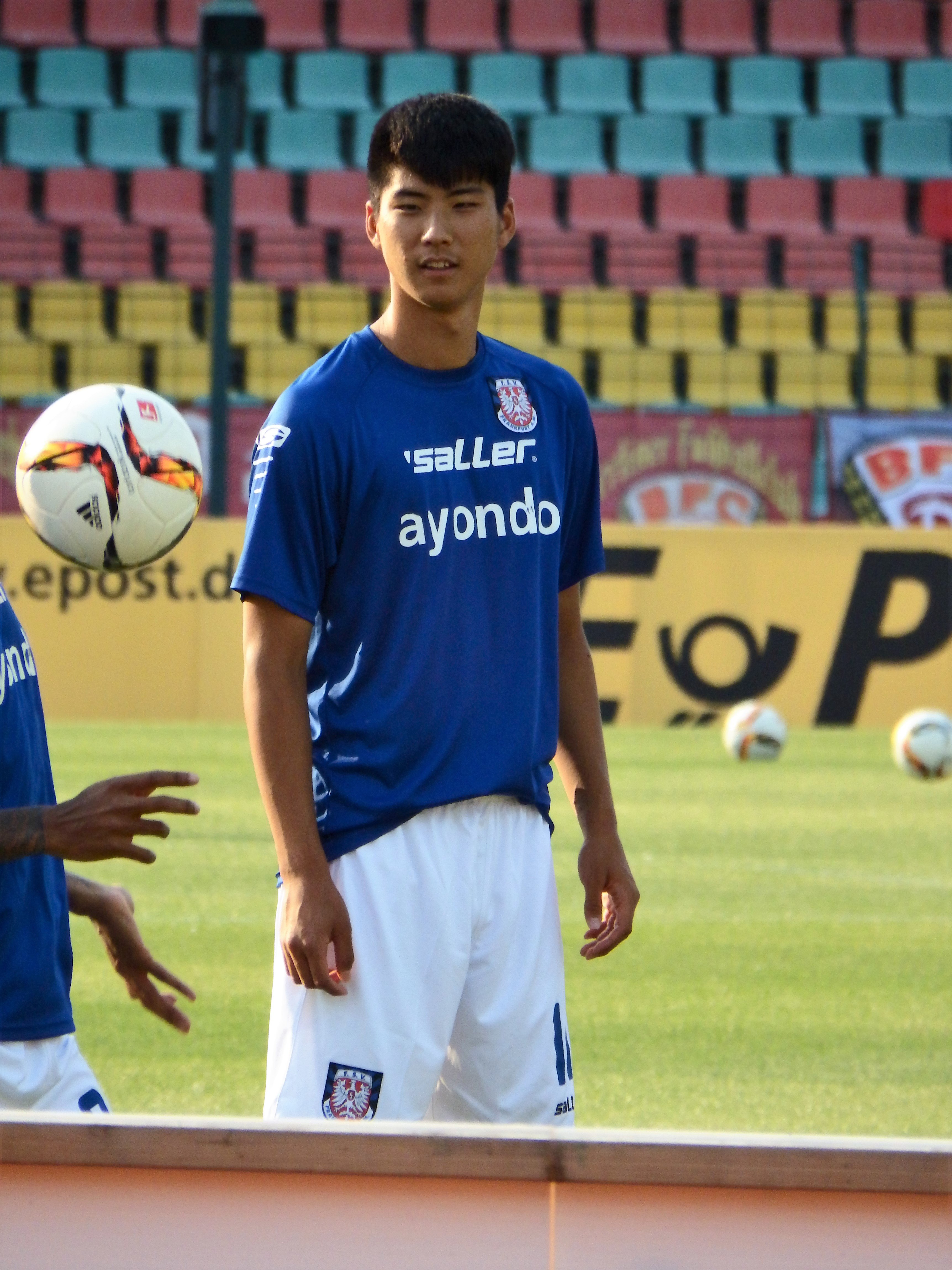 Park, In-Hyeok FSV Frankfurt